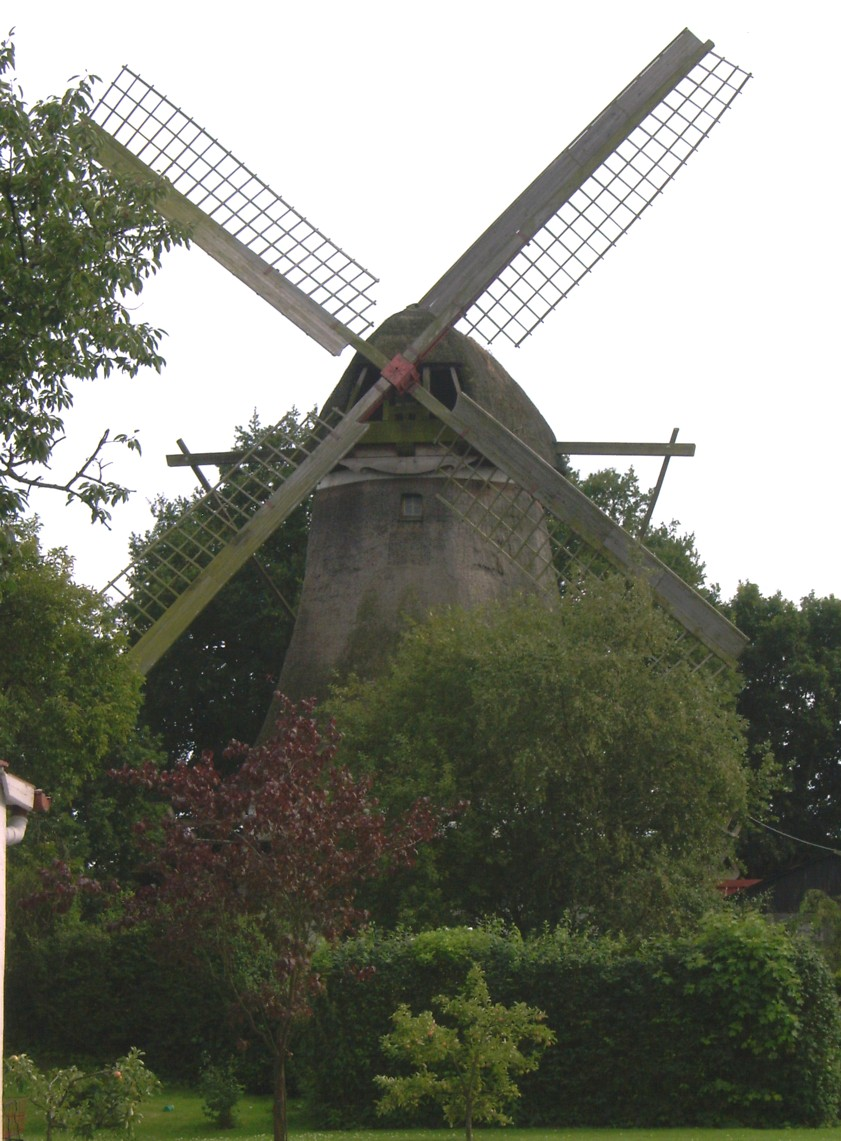 Windmühle in der Ortschaft Sandhausen (Osterholz-Scharmbeck)